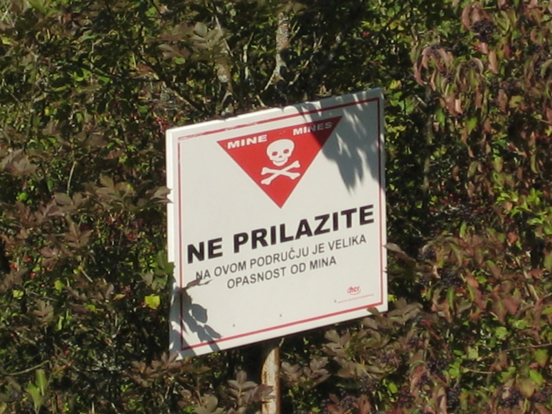 Minirano područje, Brinje, Croatia